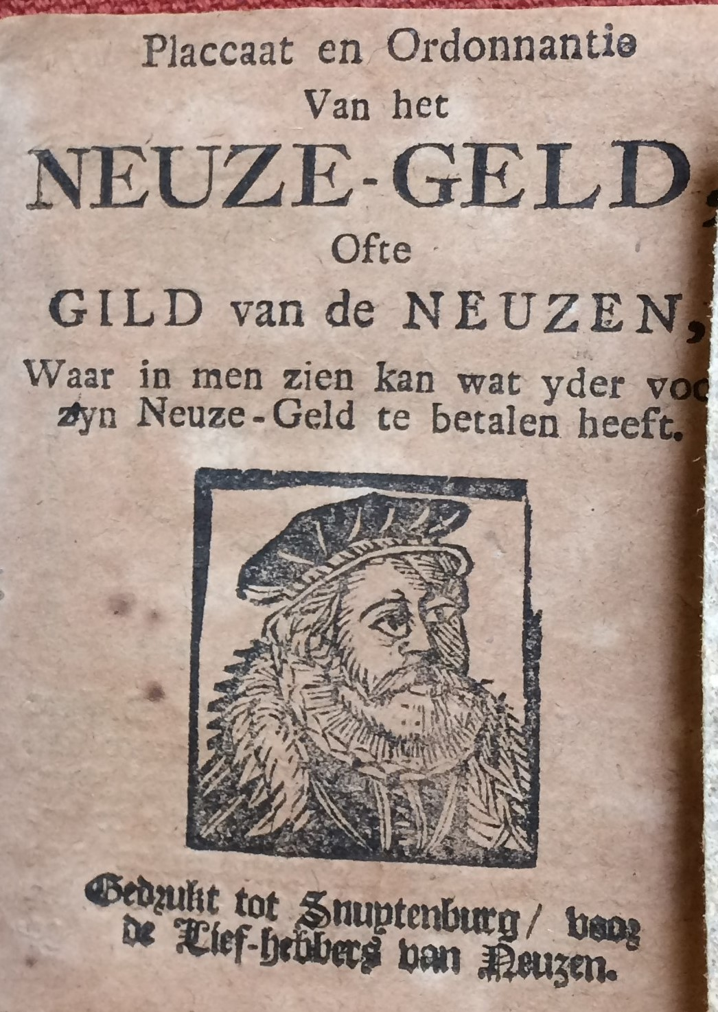 Conservé dans le Deventer almanach pour l’année 1787 (Deventer, Athenaeumbibliotheek, Dv V.302:1787).